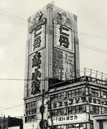 昭和7年の浅草仁丹広告塔。